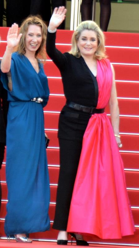 Emmanuelle Bercot et Catherine Deneuve au festival de Cannes